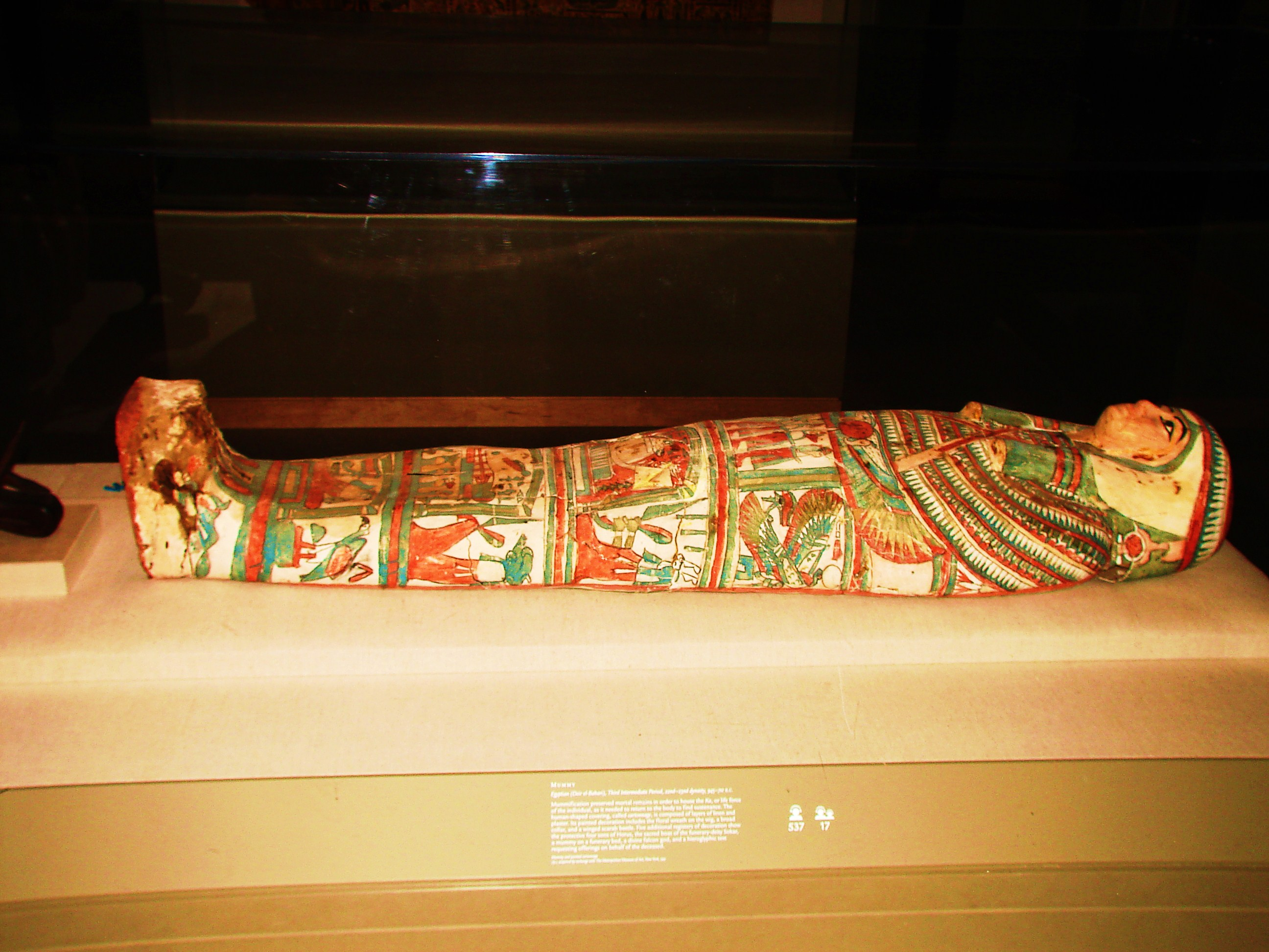 ഈജിപ്ഷ്യൻ മമ്മി- വാൾട്ടേഴ്സ് ആർട്ട് മ്യൂസിയിയത്തിലെ ശേഖരത്തിൽ നിന്നും